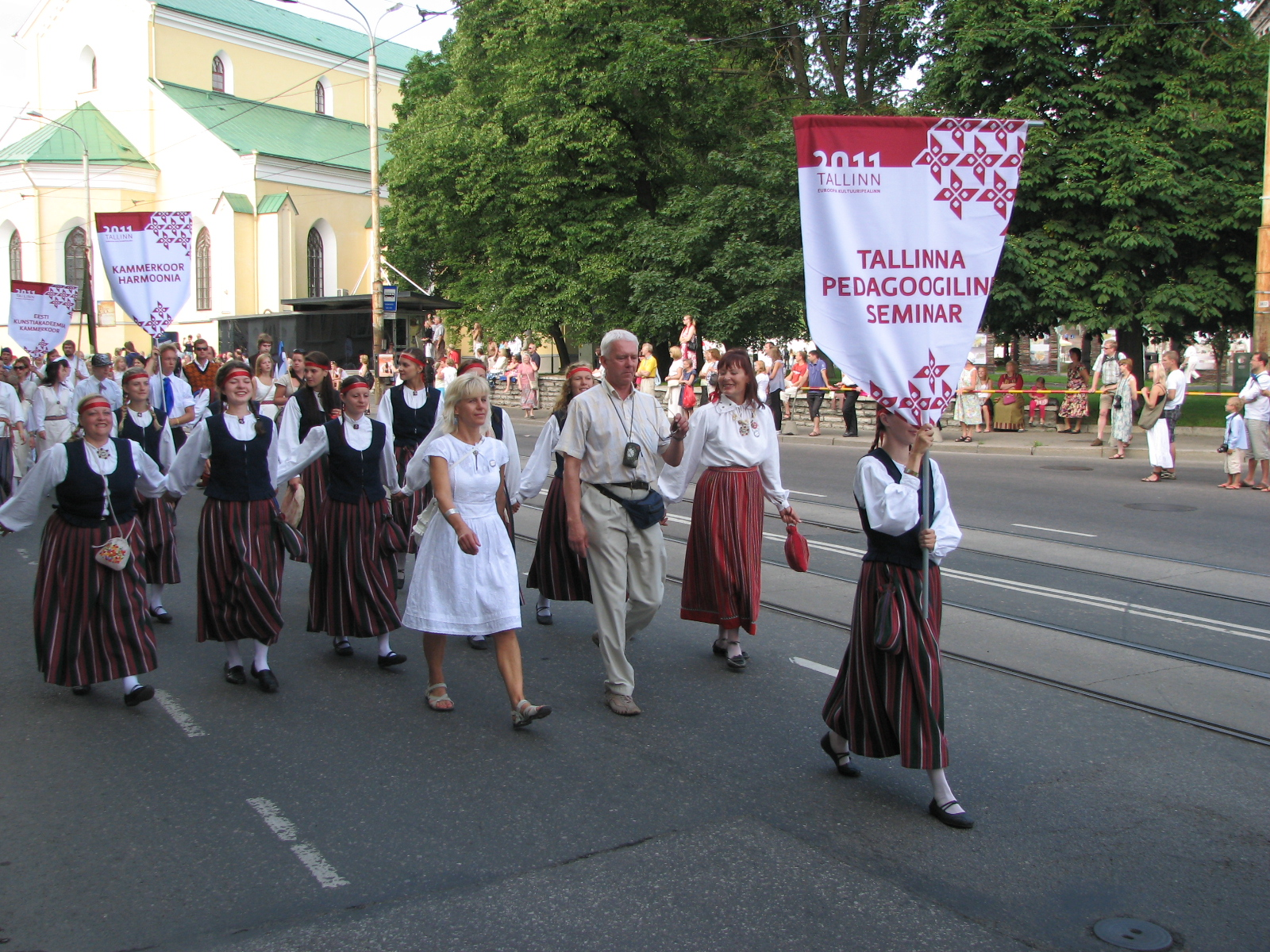 Tallinna Pedagoogilise Seminari esindus XI noorte laulu- ja tantsupeo rongkäigus